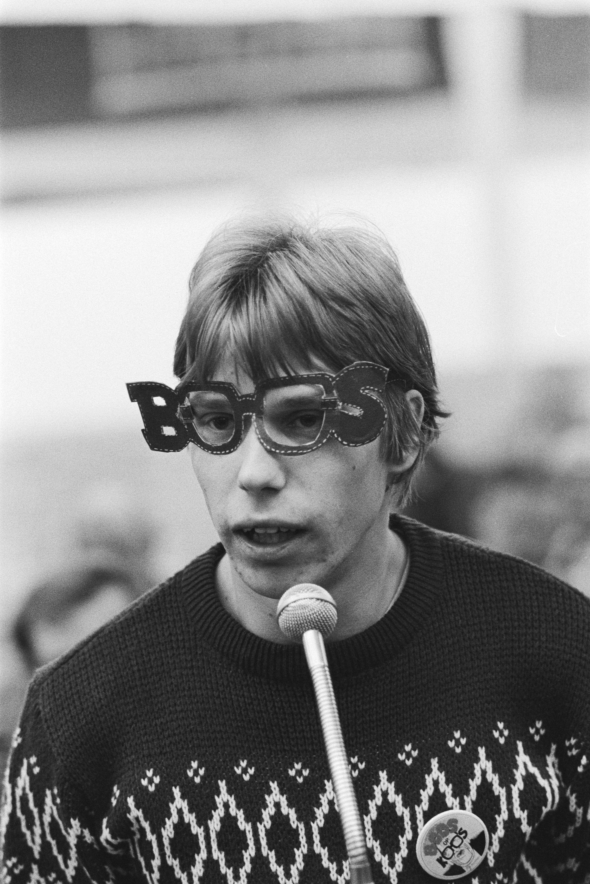 Collectie / Archief : Fotocollectie Anefo Reportage / Serie : Vergadering actievoerende douane- en belastingbeambten in Utrecht Beschrijving : Ambtenaar met bril "Boos" Datum : 2 december 1983 Locatie : Utrecht (provincie), Utrecht (stad) Trefwoorden : ambtenaren, loon- en prijsbeleid, vergaderingen Fotograaf : Antonisse, Marcel / Anefo, [onbekend] Auteursrechthebbende : Nationaal Archief Materiaalsoort : Negatief (zwart/wit) Nummer archiefinventaris : bekijk toegang 2.24.01.05 Bestanddeelnummer : 932-7951